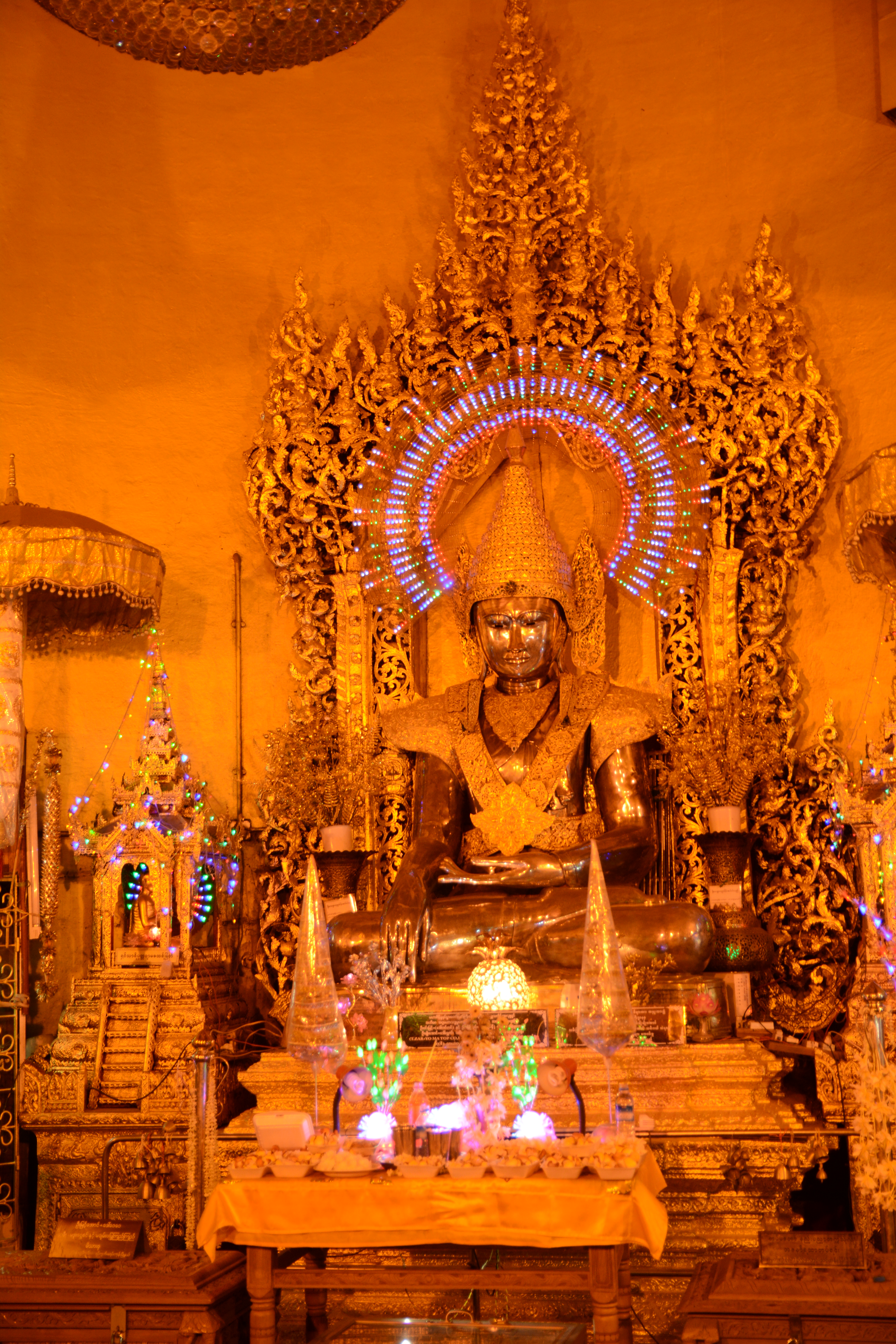 Kaba Aye Paya